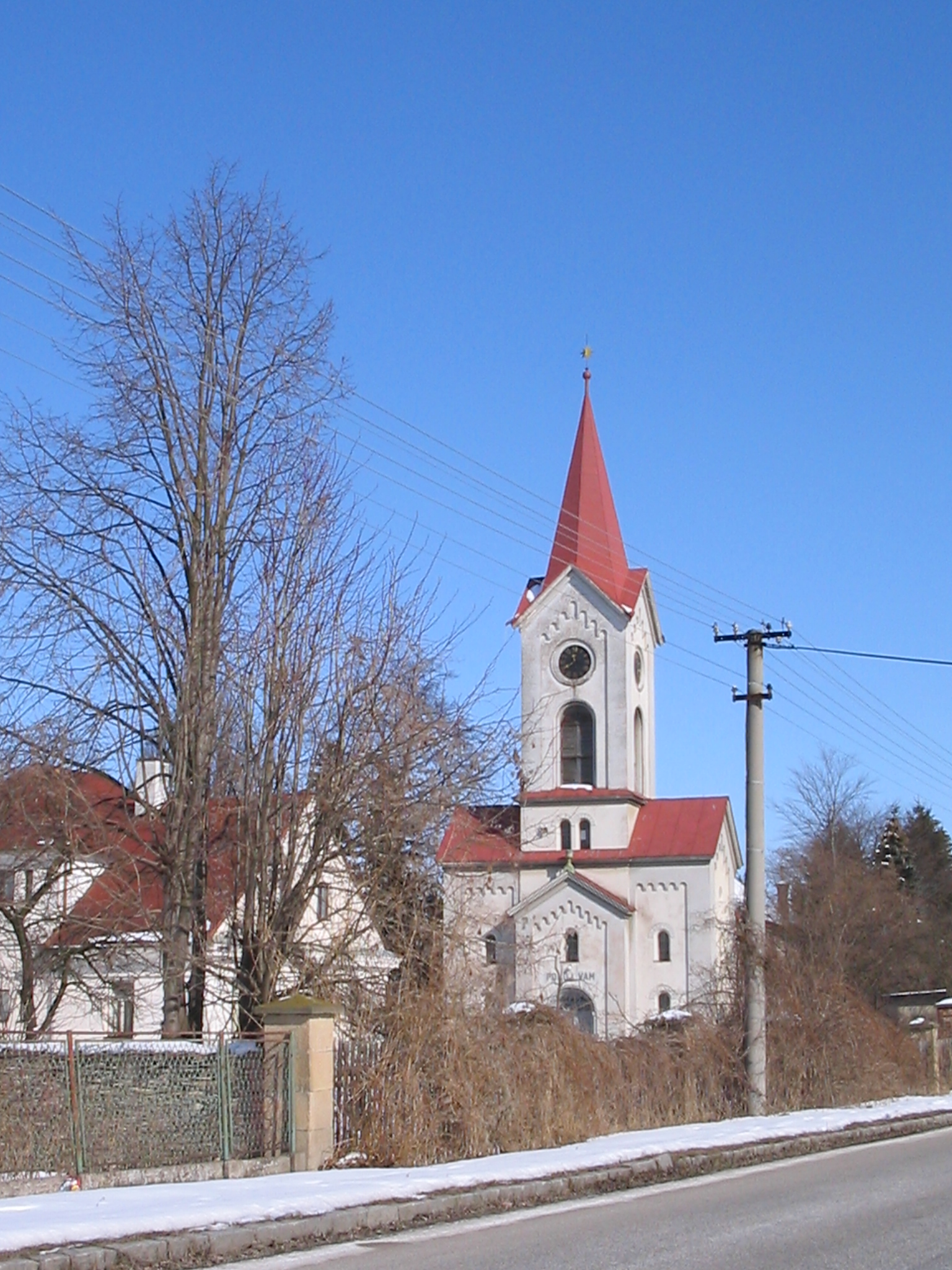 Bývalý kostel a fara h.v. v Černilově (ČR), dnes sídlo místního sboru ČCE